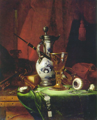 Stilleben mit Fayencekanne, Fussglas, Taschenuhr und Pfeife